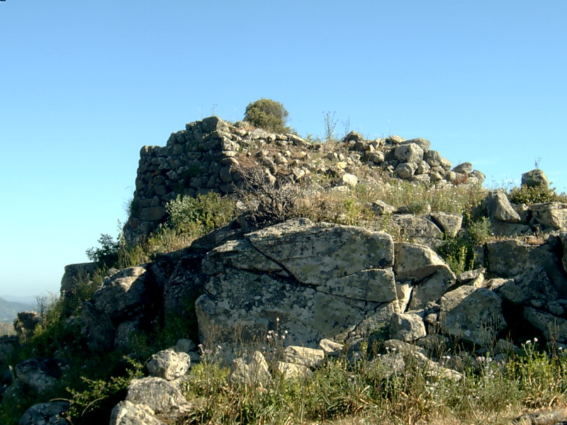 nuraghe monte Torru